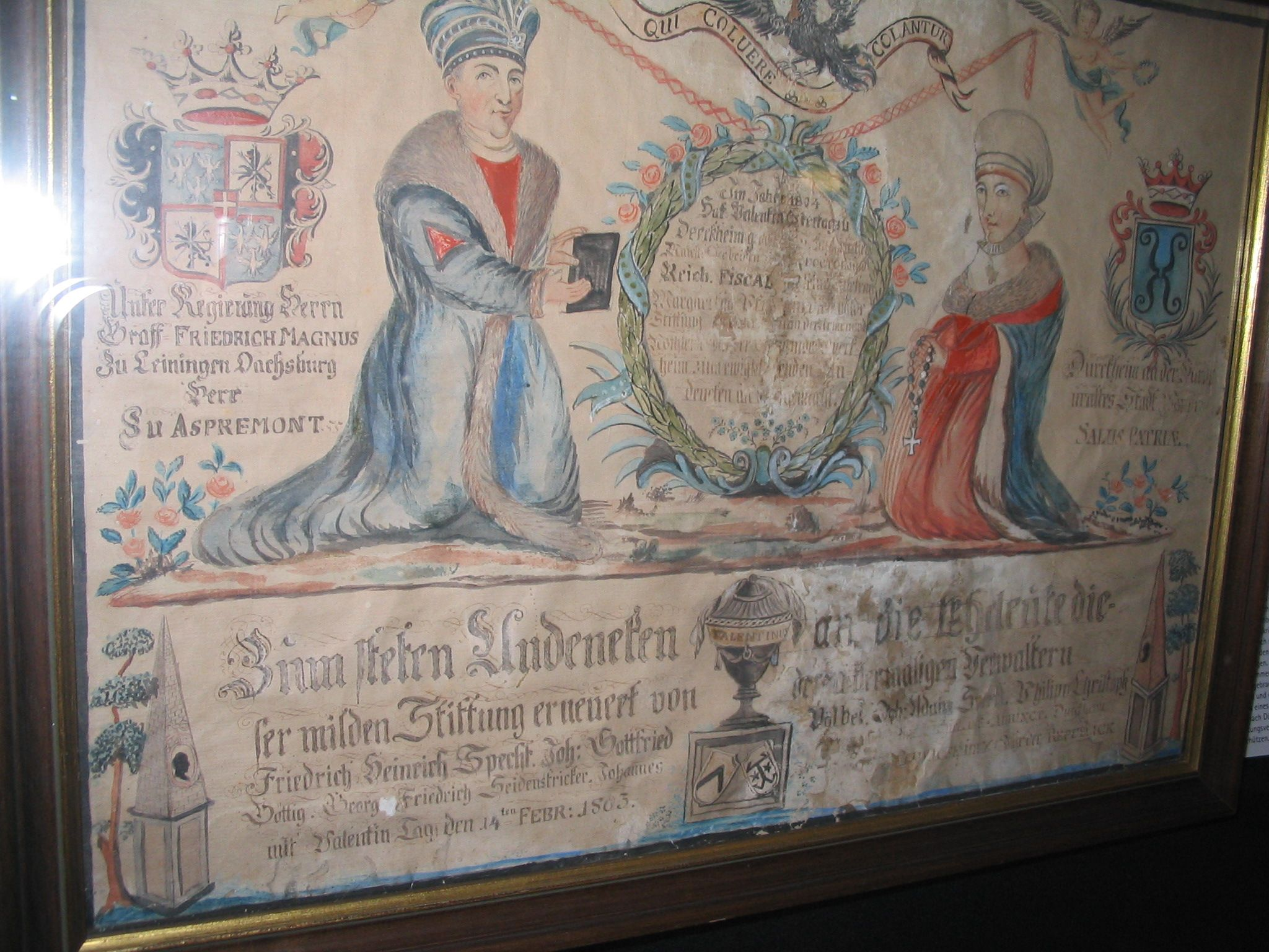 Heimatmuseum Bad Dürkheim Aquarell Sechserrat. Beigefügte Beschreibung: Valentinus Turckheim, Nalutis Rhenanus Aquarell 1803 Auf dem Aquarell verewigte sich der damalige Sechserrat mit Namen. nachdem es gelungen war, die Gründungsurkunde der Stiftung, die sich heute als Leihgabe im Landesarchiv in Speyer befindet, unbeschadet durch die Wirren der französischen Revolutionskriege zu bringen. Einer Legende nach wollten die Sechser am 11. April 1794 die Urkunde von den französischen Truppen retten und nach Mannheim bringen. Unterwegs wurden ihnen die Unterlagen jedoch abgenommen. Man erfuhr, dass die Urkunde nach Wachenheim gebracht worden war, wo man sie in einer Gartenlaube fand und den Soldaten für sechs Kronenthaler abkaufen konnte. Dank eines Schutzbriefes konnte man sie unbeschadet wieder nach Dürkheim bringen. Darüber hinaus gelang es, das Stiftungsvermögen durch die Vereinnahmung durch den Staat zu schützen.